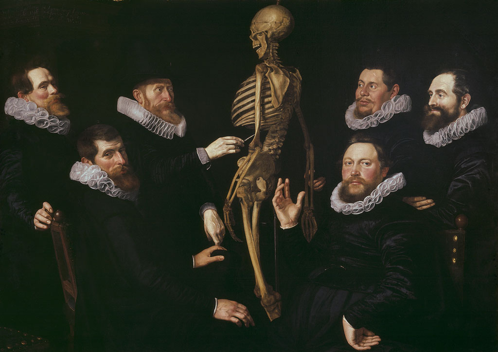 schilderij; ambachten en beroepen; onderwijs; Chirurgijnsgilde; portret; groepsportret; anatomische les; skelet; Egbertsz., Sebastiaen; Uytdenhooven, Anthonie Jansz.; Koolvelt, Hendrick Claesz.; Jacobsz, Lambert; Indies, Gerrit; Wees, Jan Arentsz. de